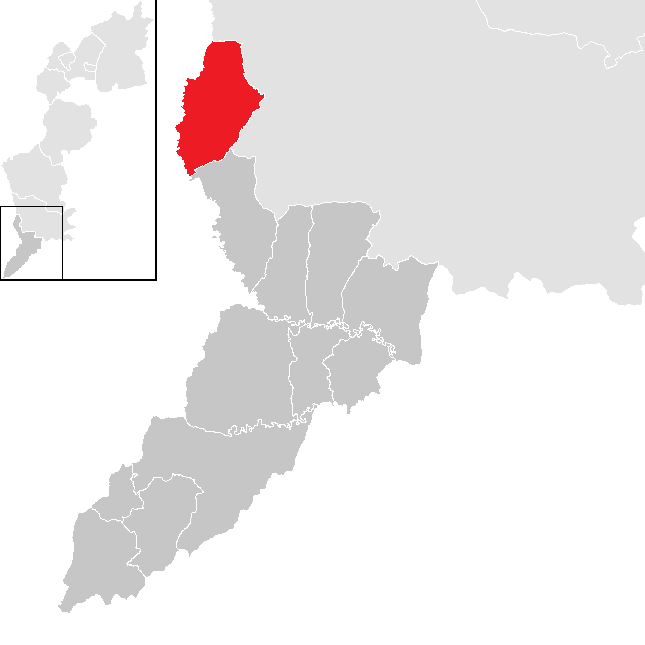 Bezirk Jennersdorf